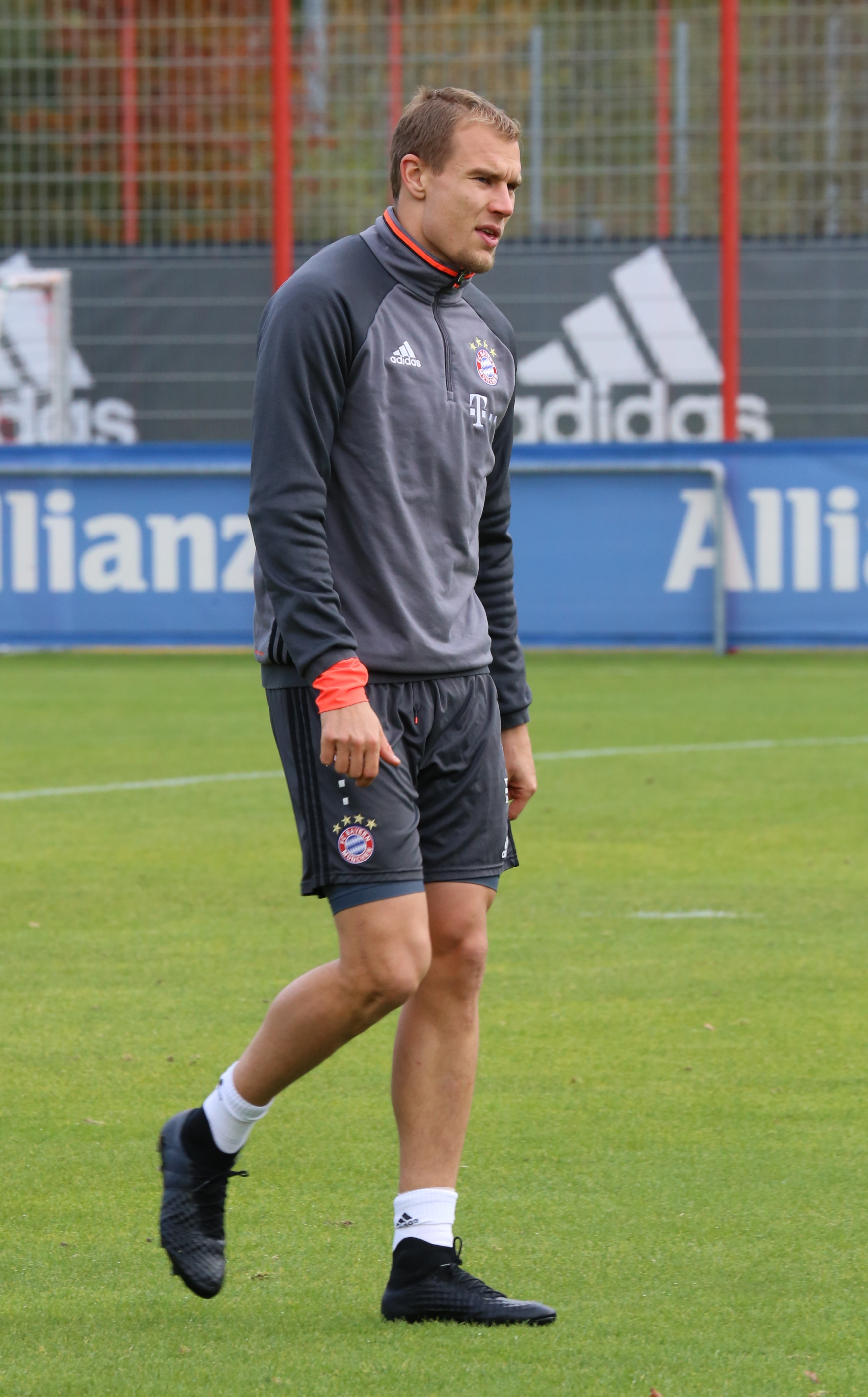 Holger Badstuber beim Training auf dem Gelände des FC Bayern München (November 2016)